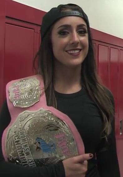 Britt Baker donnant une interview en coulisse portant sont titre de IWC Women's Champion